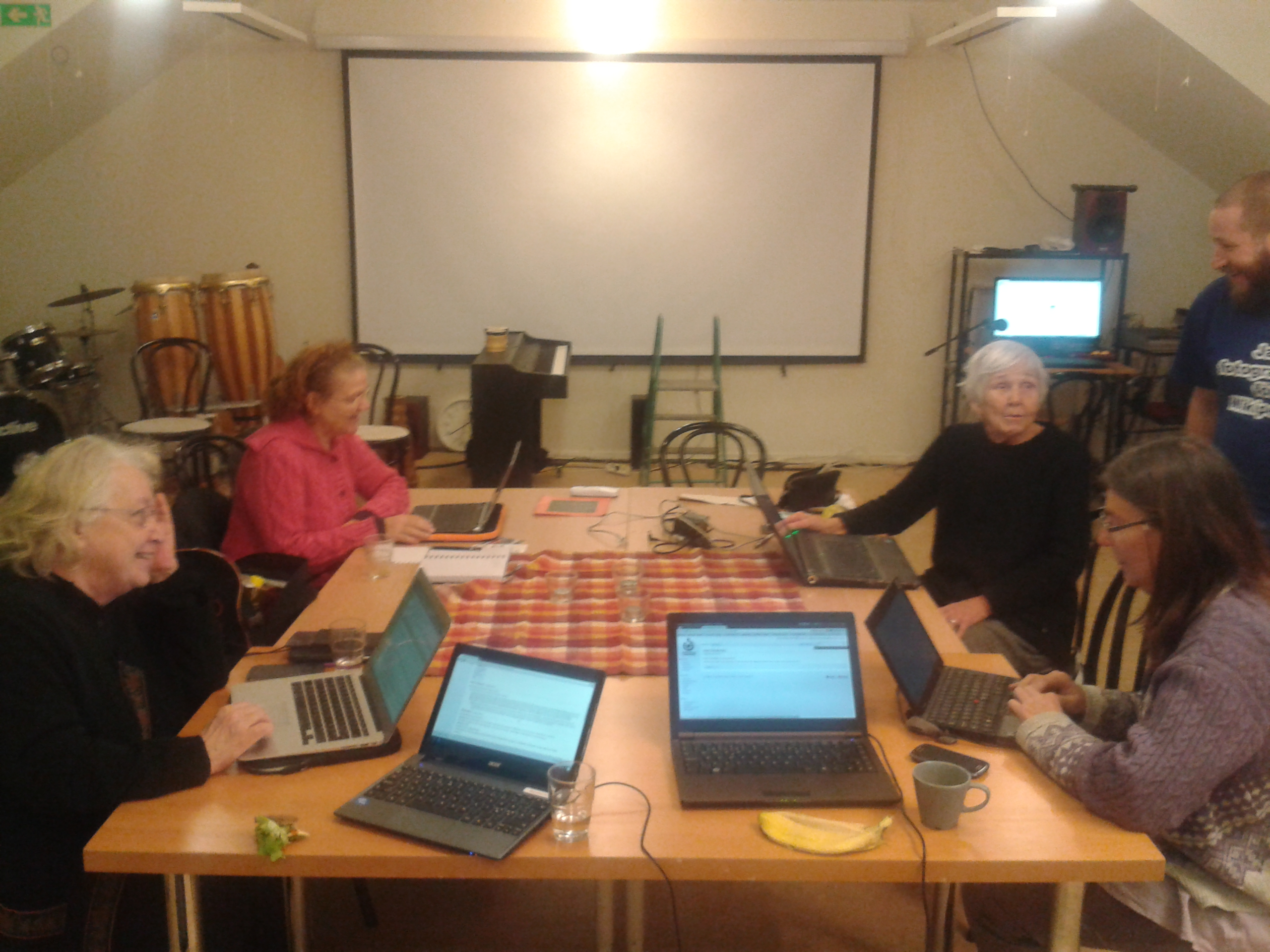 Bild från skrivarstuga på Solidaritetshuset 28 november 2013 med särskild inriktning på att hjälpa kvinnliga användare.